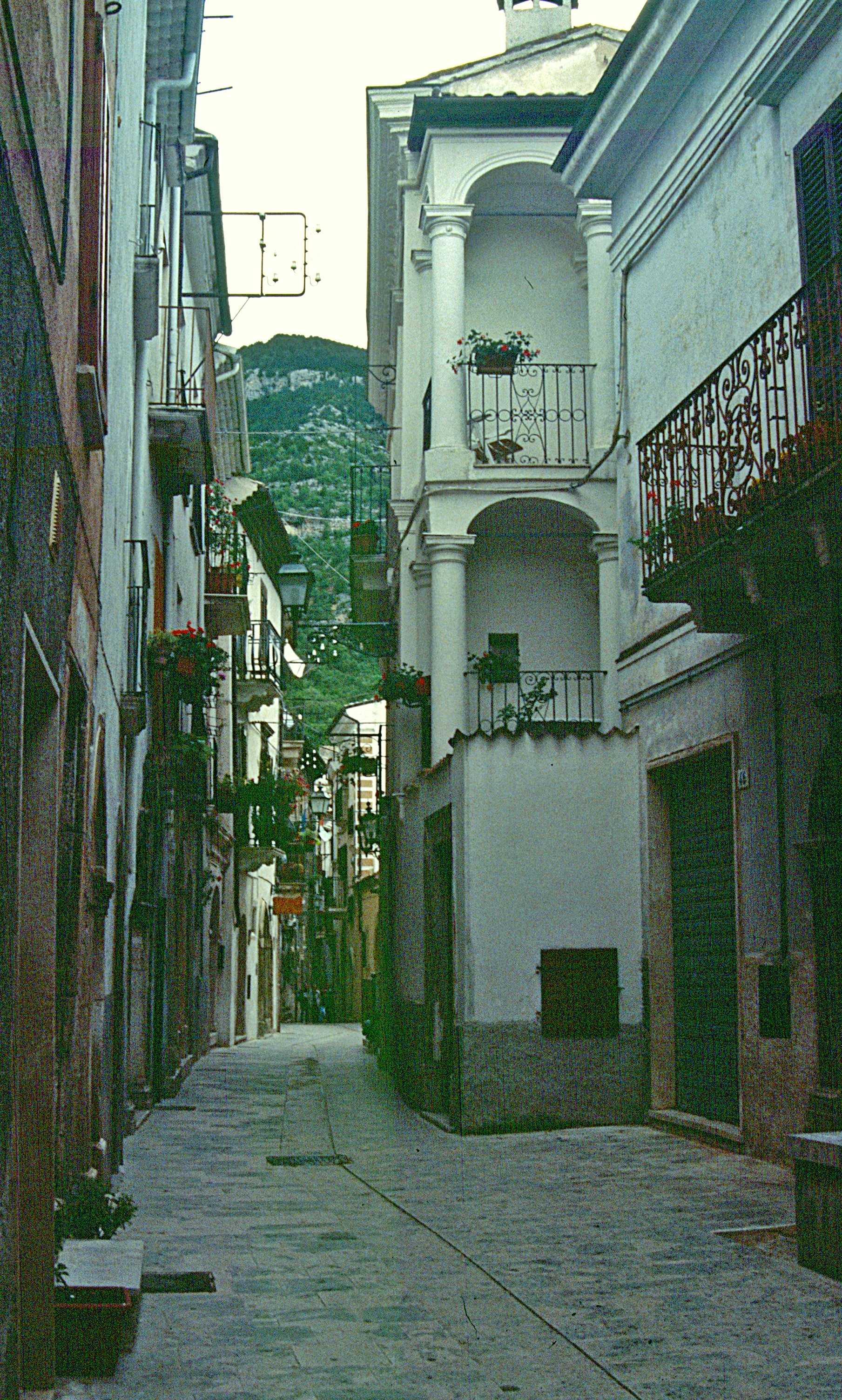 Pacentro